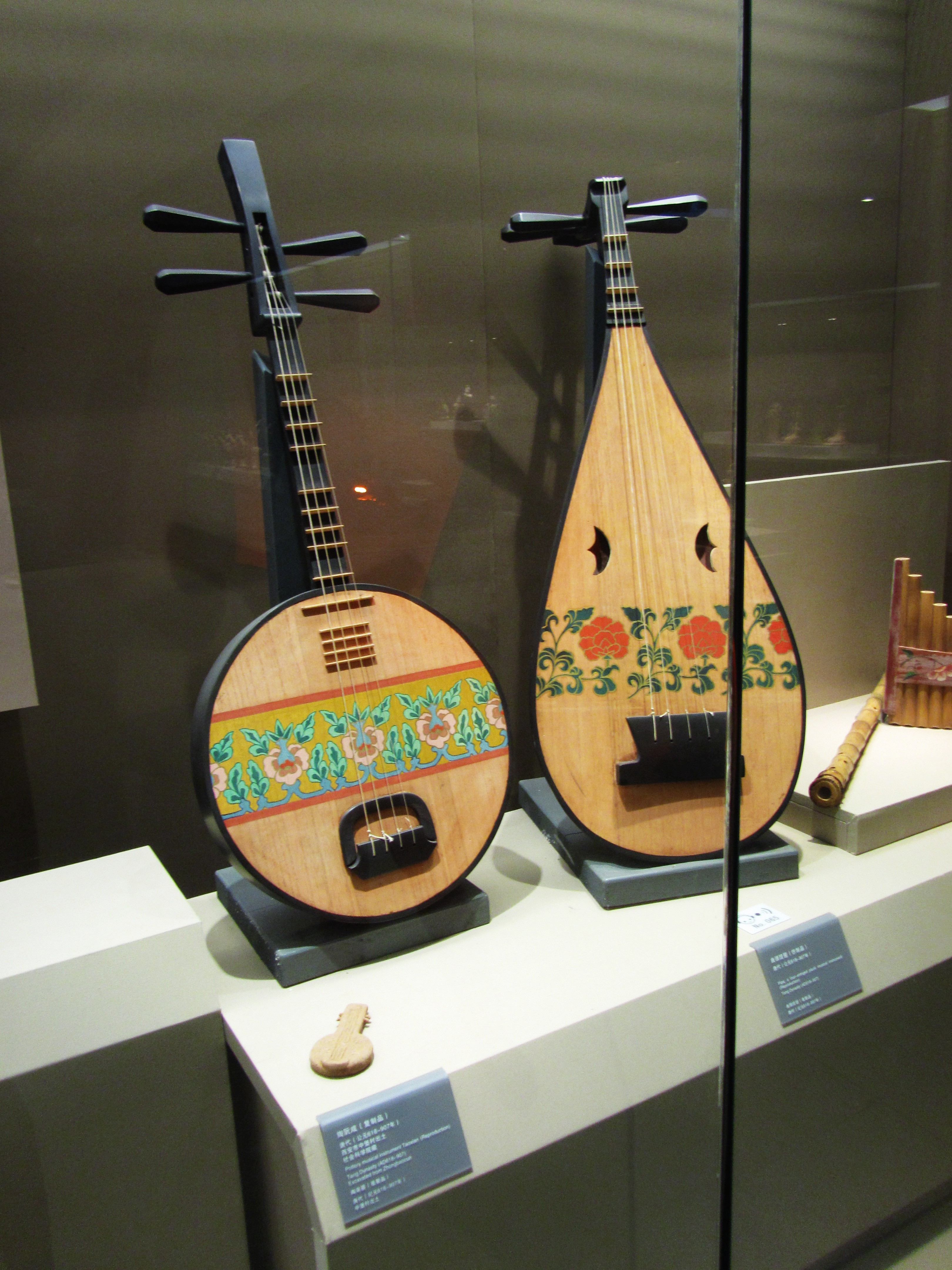 唐代阮咸和曲颈琵琶复制品，大唐西市博物馆藏。